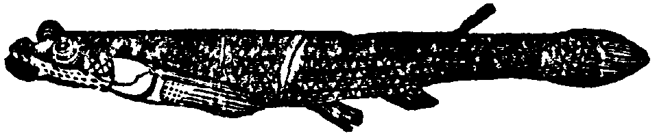 Anableps.